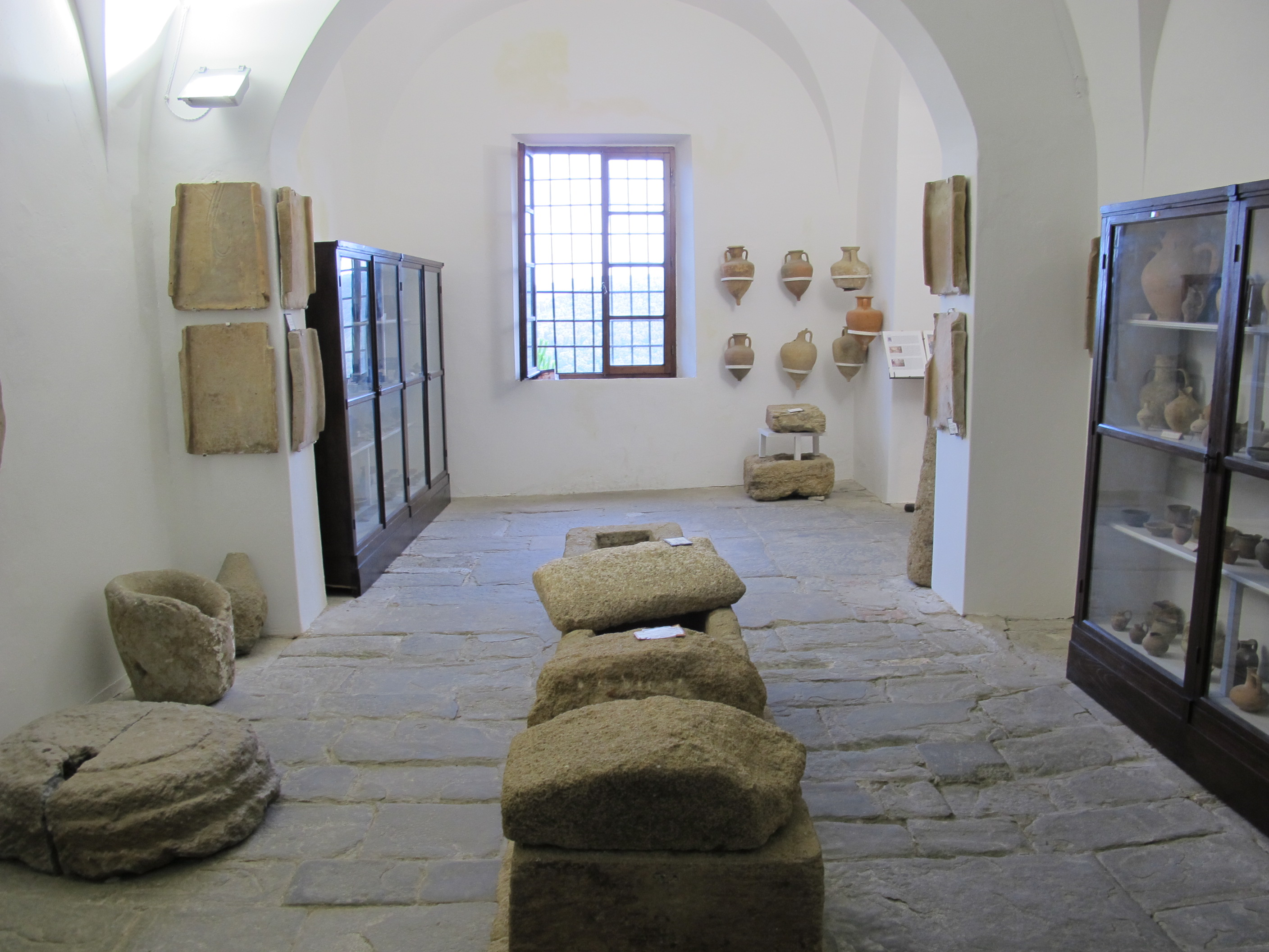 Museo etrusco di populonia (coll. gasparri), sala